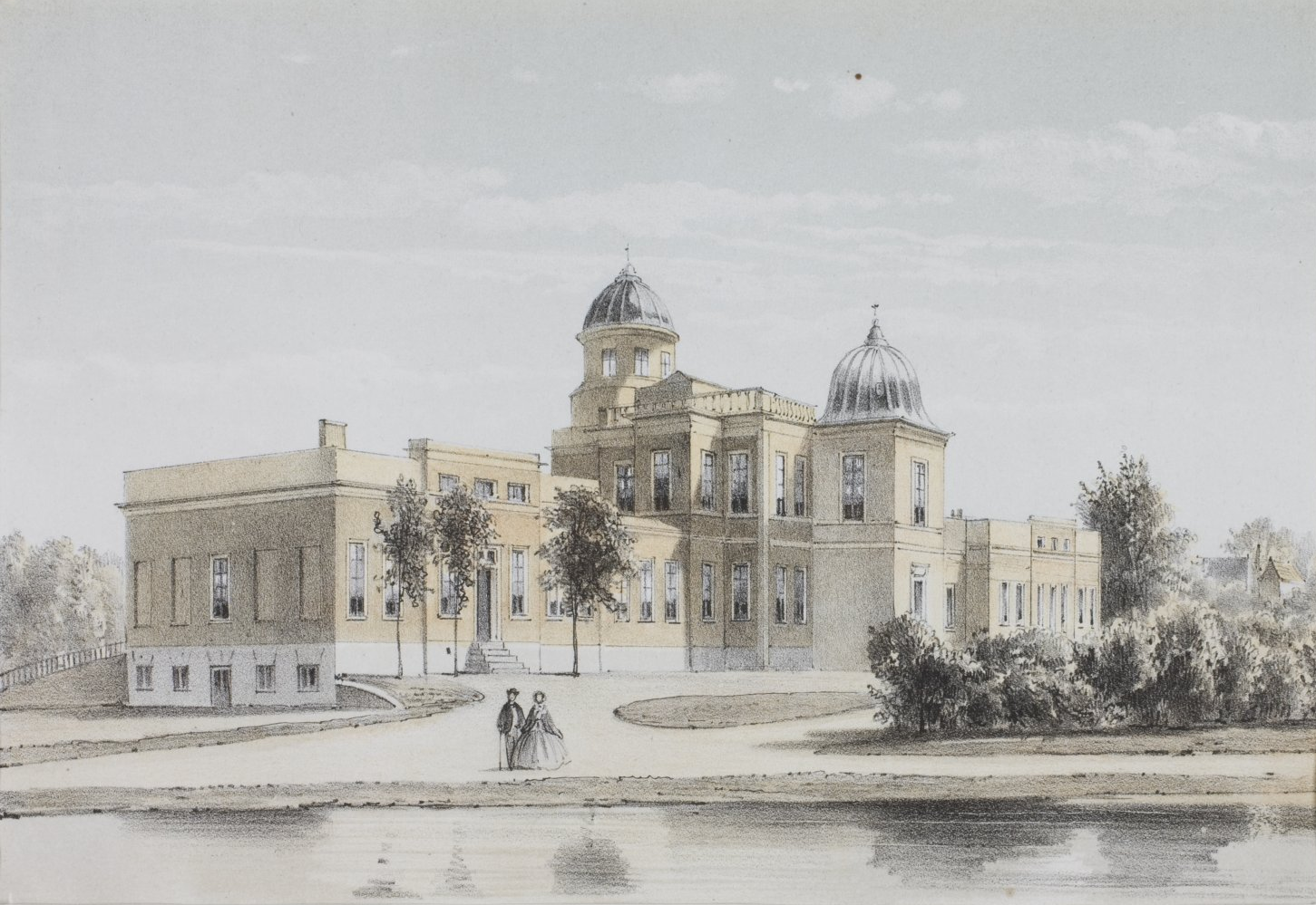 "De Sterrewacht" gezien vanaf de Witte Singel. Naar de natuur door G.J. Bos, Steendruk van P.W.M. Trap, Uitgave van D.J. Couveé. Midden 19e eeuw